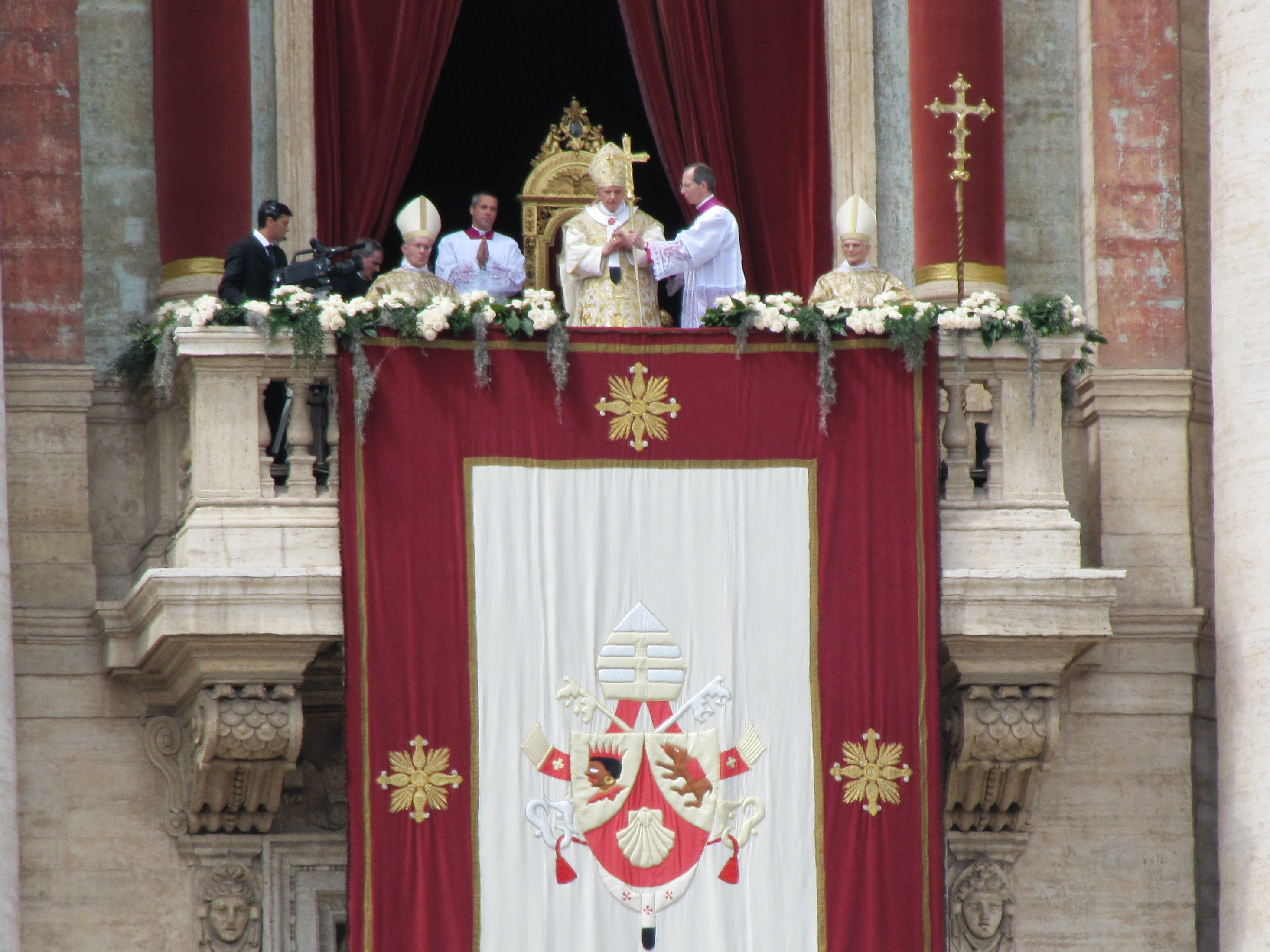 האפיפיור בנדיקטוס ה-16 מברך במיסה של יום ראשון בחג הפסחא